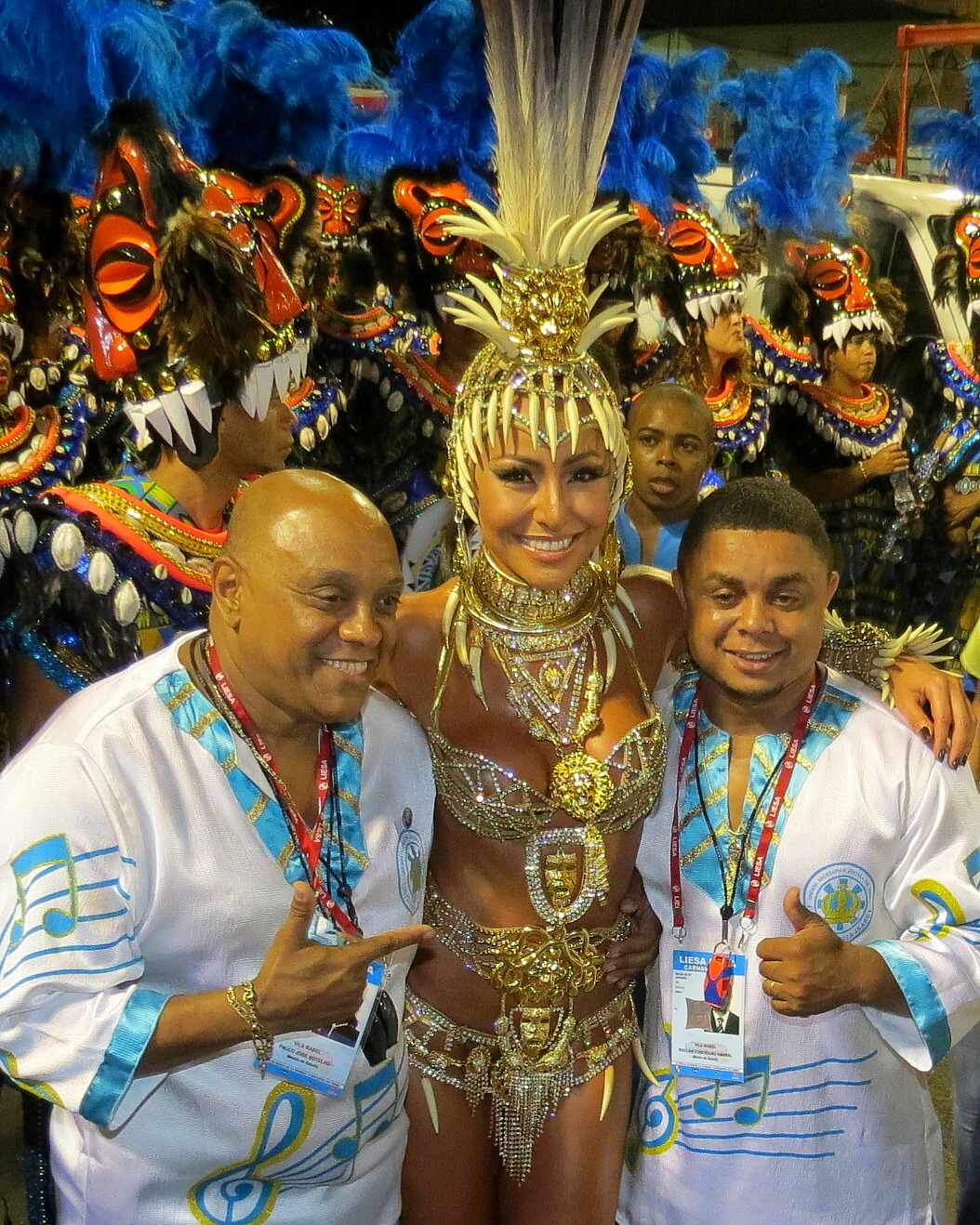 Unidos de Vila Isabel - Rio Carnaval 2012 11